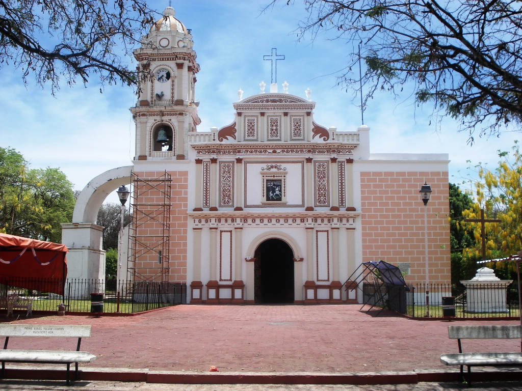 Parroquia de Santiago Apóstol en Huitzuco, Guerrero, México.